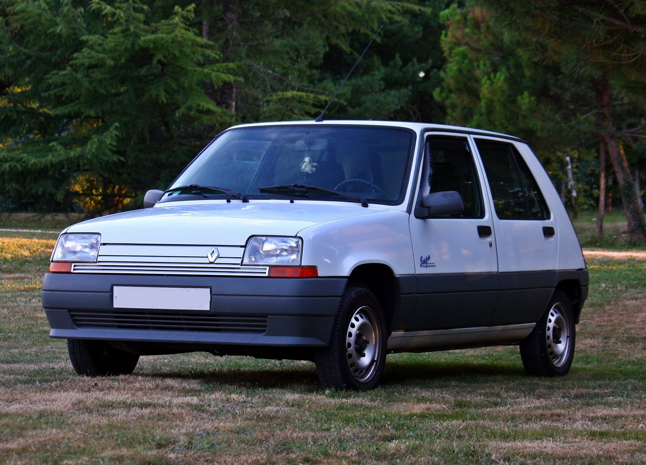 Renault supercinq saga 1996 1.4i